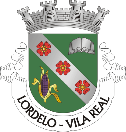 Brasão da freguesia de Lordelo (concelho de Vila Real)